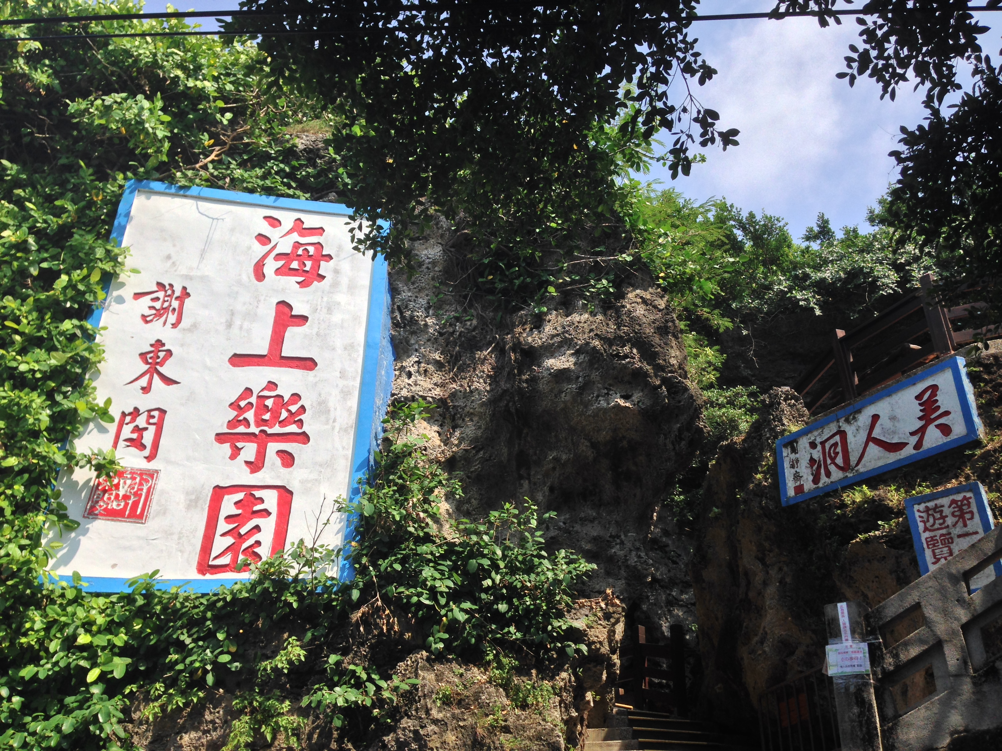 中文（台灣）: 小琉球美人洞